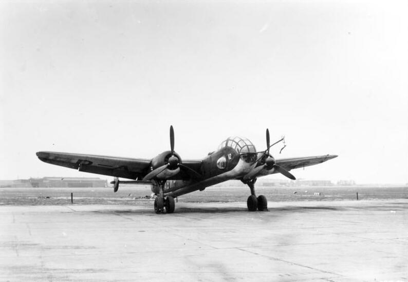 Junkers Ju 288 V 2 (1941) Werkfoto Junkers (MBB) 288/4